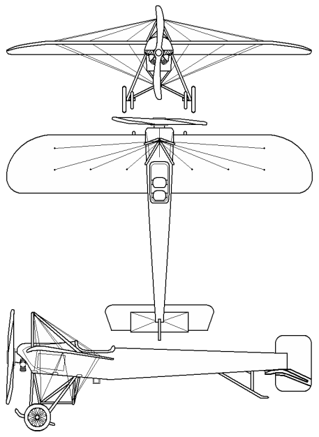 Aeroplano Morane-Borel.